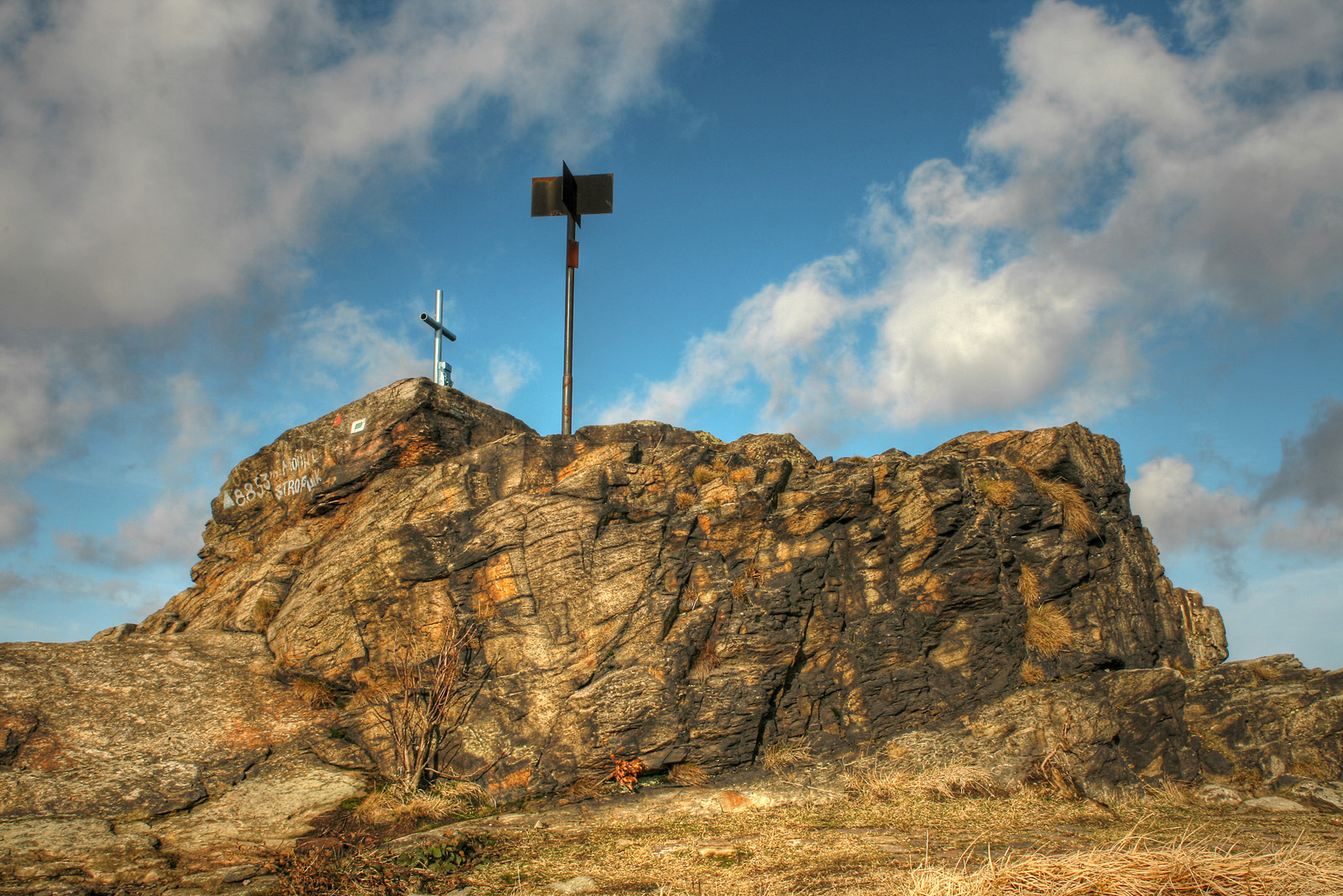 Stropník mit Gipfelkreuz